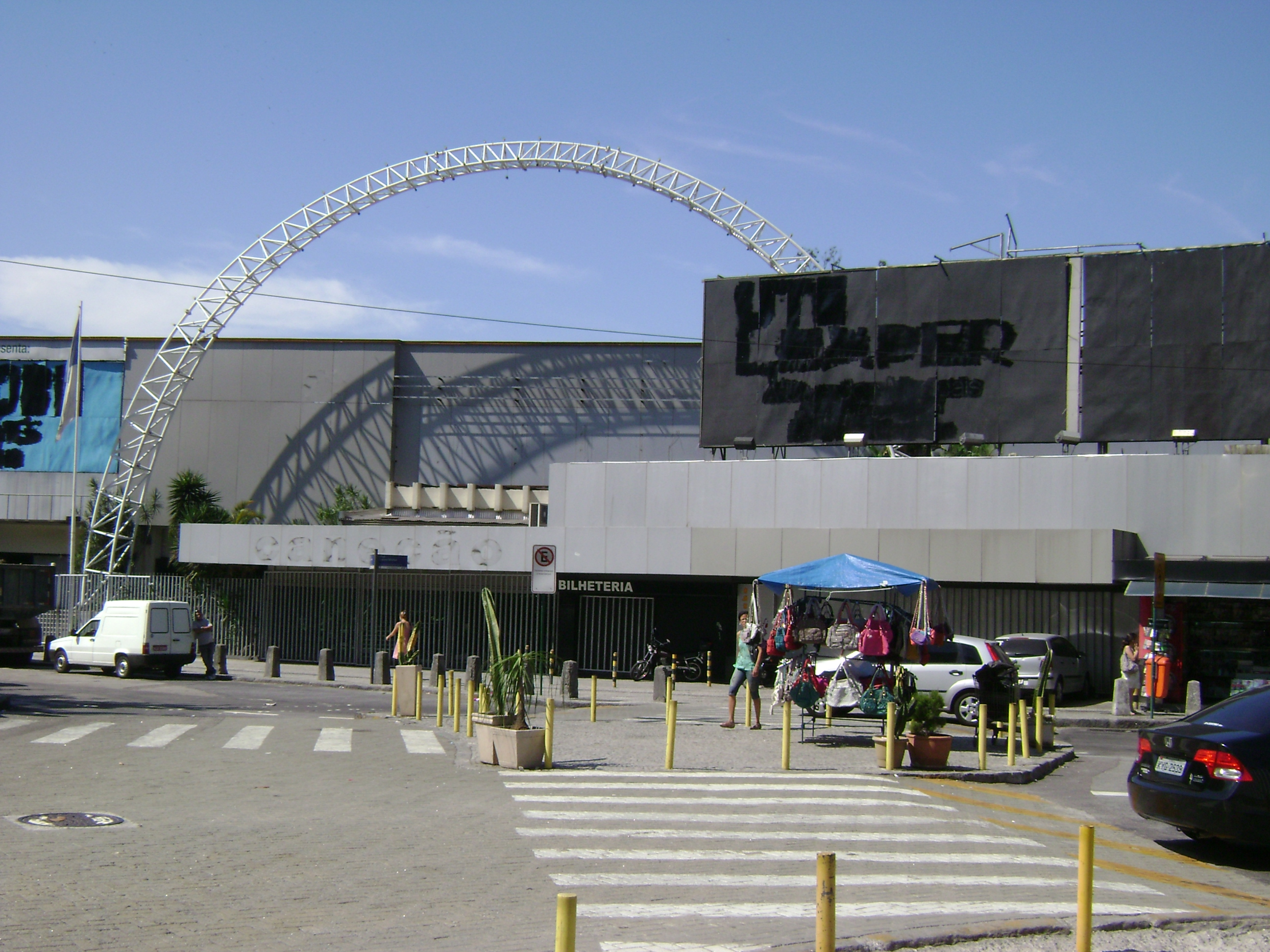 Fachada da casa denominada Canecão com seu logotipo retirado na fachada, no bairro Botafogo, na cidade do Rio de Janeiro, Brasil.